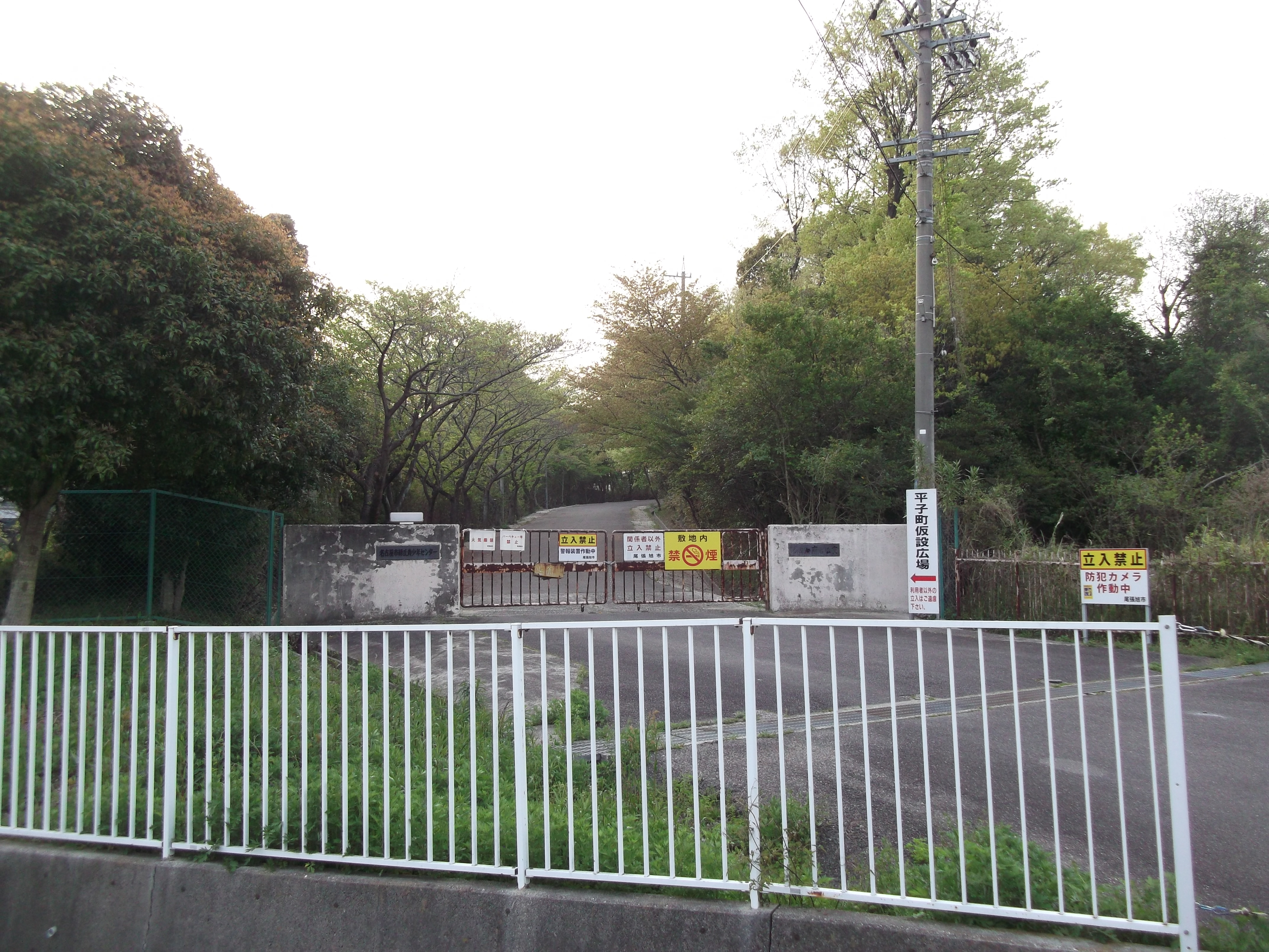 愛知県尾張旭市の名古屋市若松寮・名古屋市立緑丘小学校中学校跡地入口